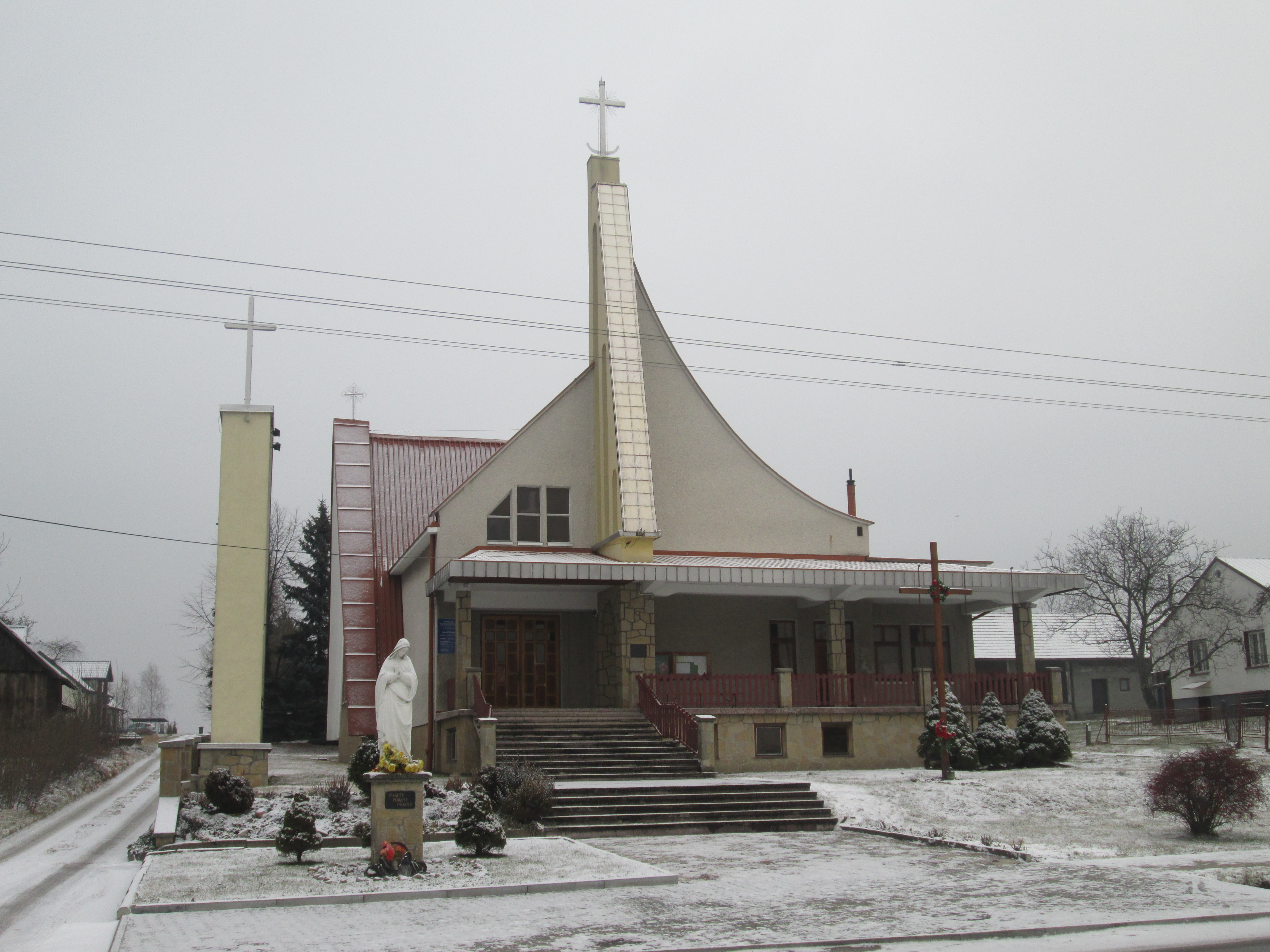 Kawęczyn Sędziszowski - Parafia Podwyższenia Krzyża Świętego